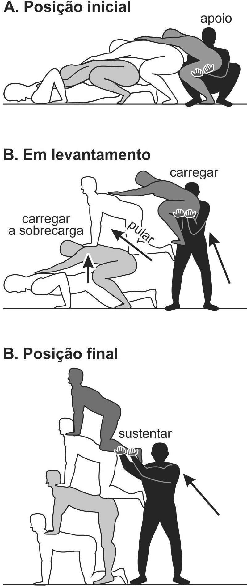 4-layers pyramid standing up